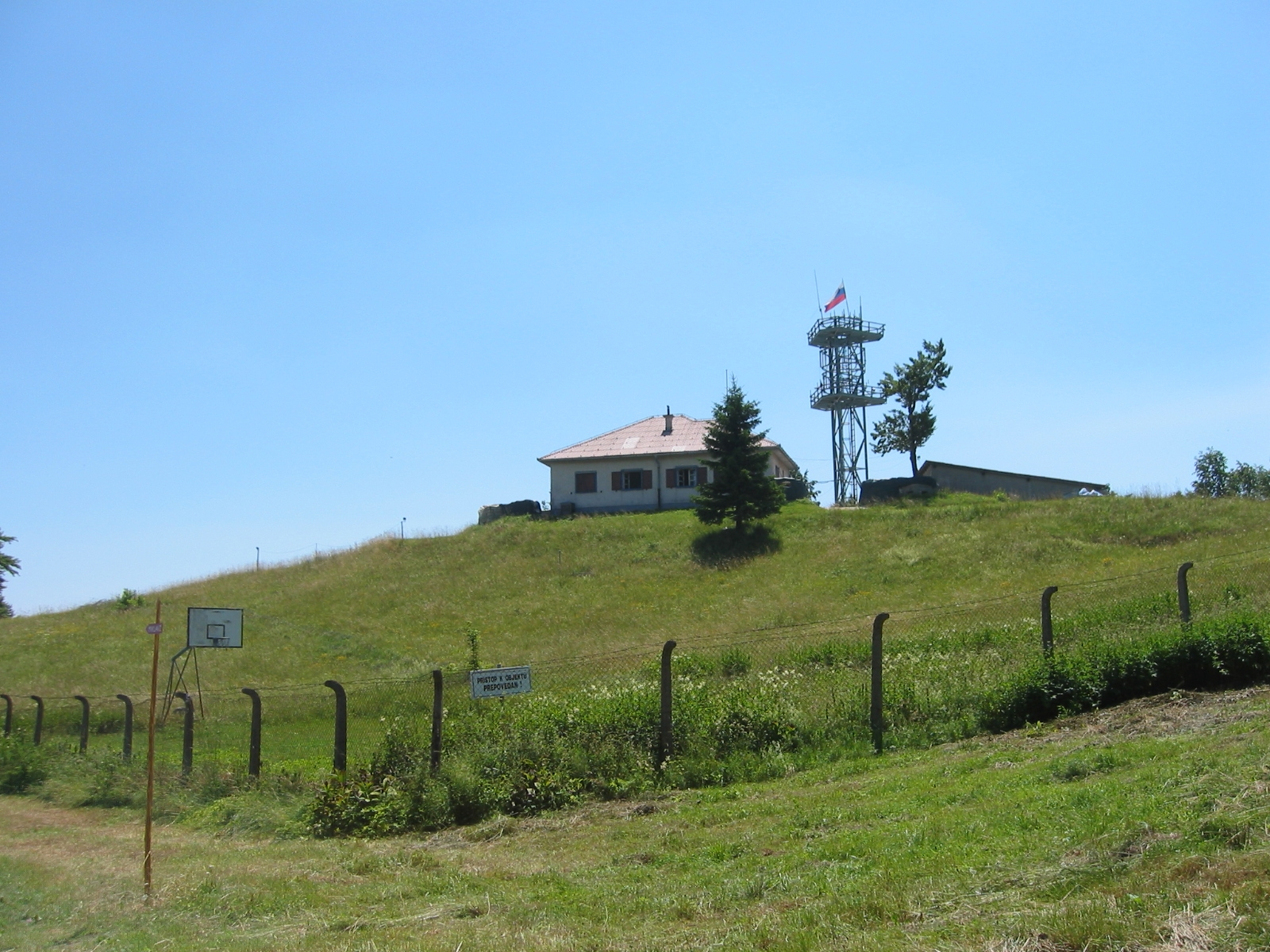 Trdinov vrh vojašnica / Trdinov vrh, barracks